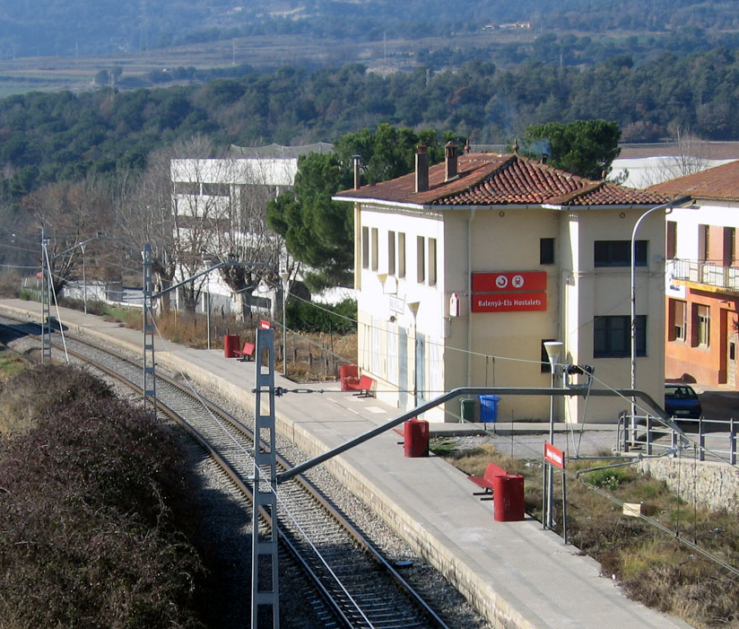 estación de Adif (antes de RENFE) de Hostalets de Balenya